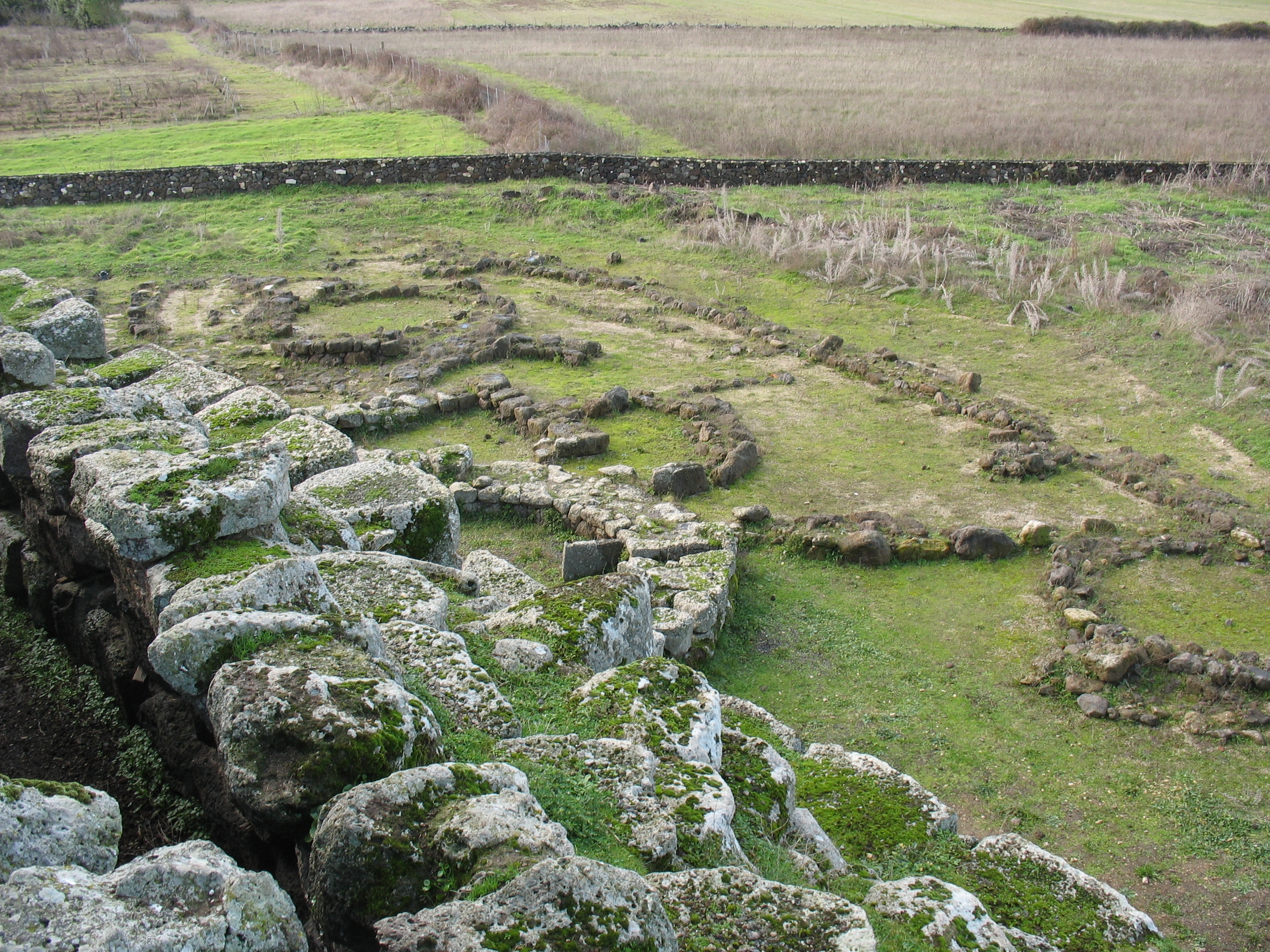 Torralba (Sardinien), östlicher Vorplatz mit Siedlungsresten vor der Nuraghe Santu Antine